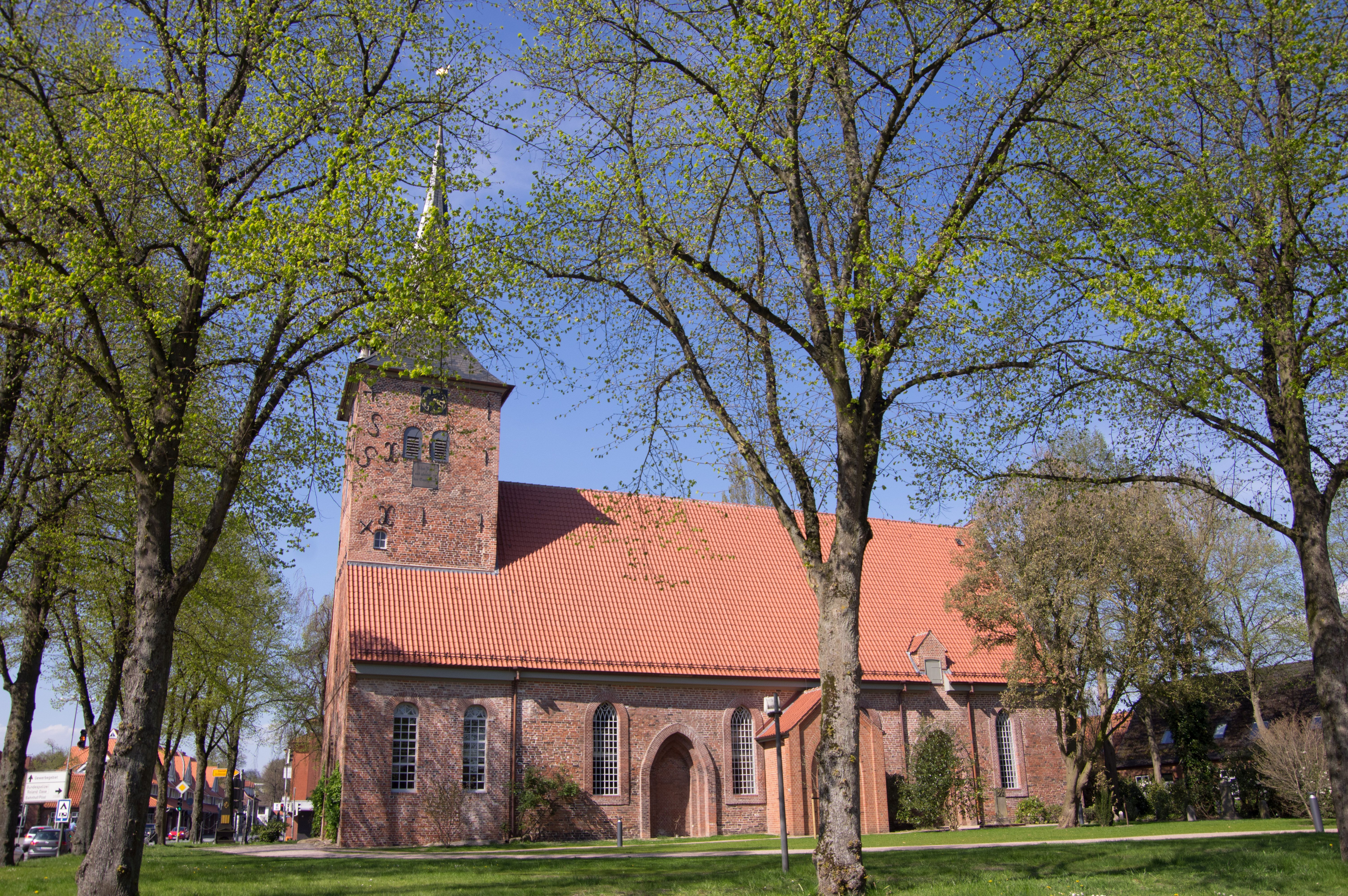 Bad Bramstedt in Schleswig-Holstein. Die Maria-Magdalenen-Kirche ist ein Baudenkmal. Das Bild zeigt Detail aus dem Inneren, siehe Dateiname.